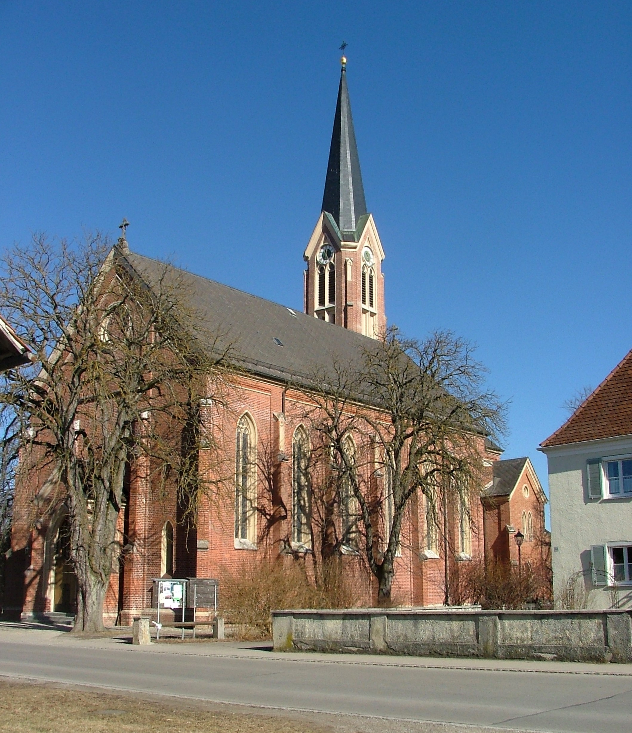 Westerheim Kirche